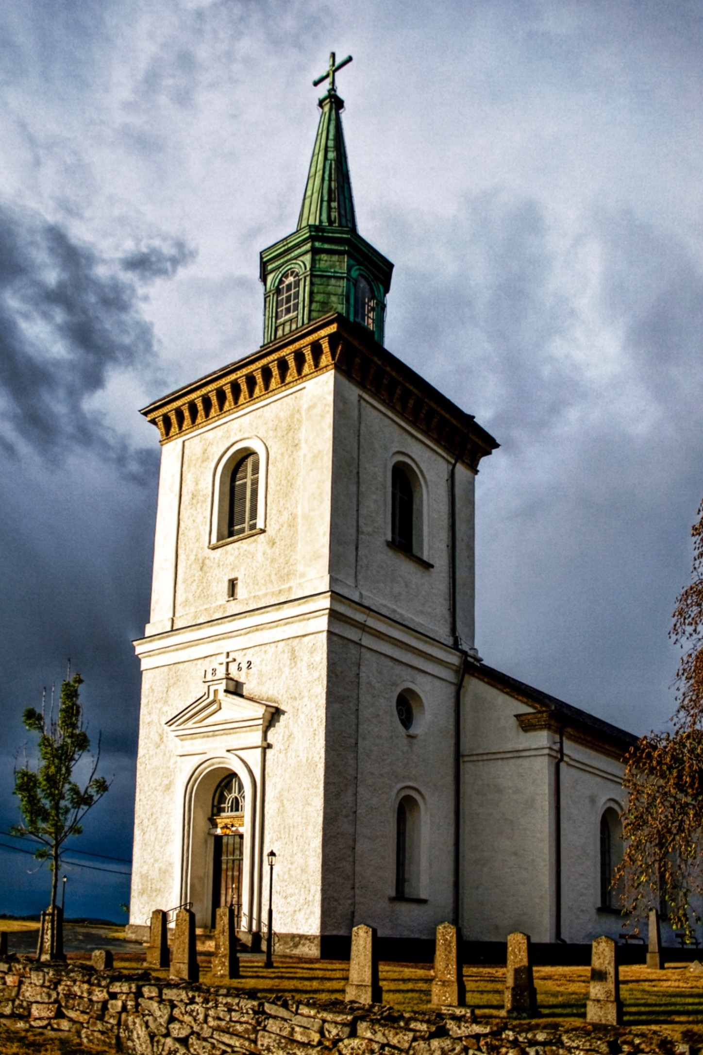 Stafsinge Church in Falkenberg Municipality, Sweden.